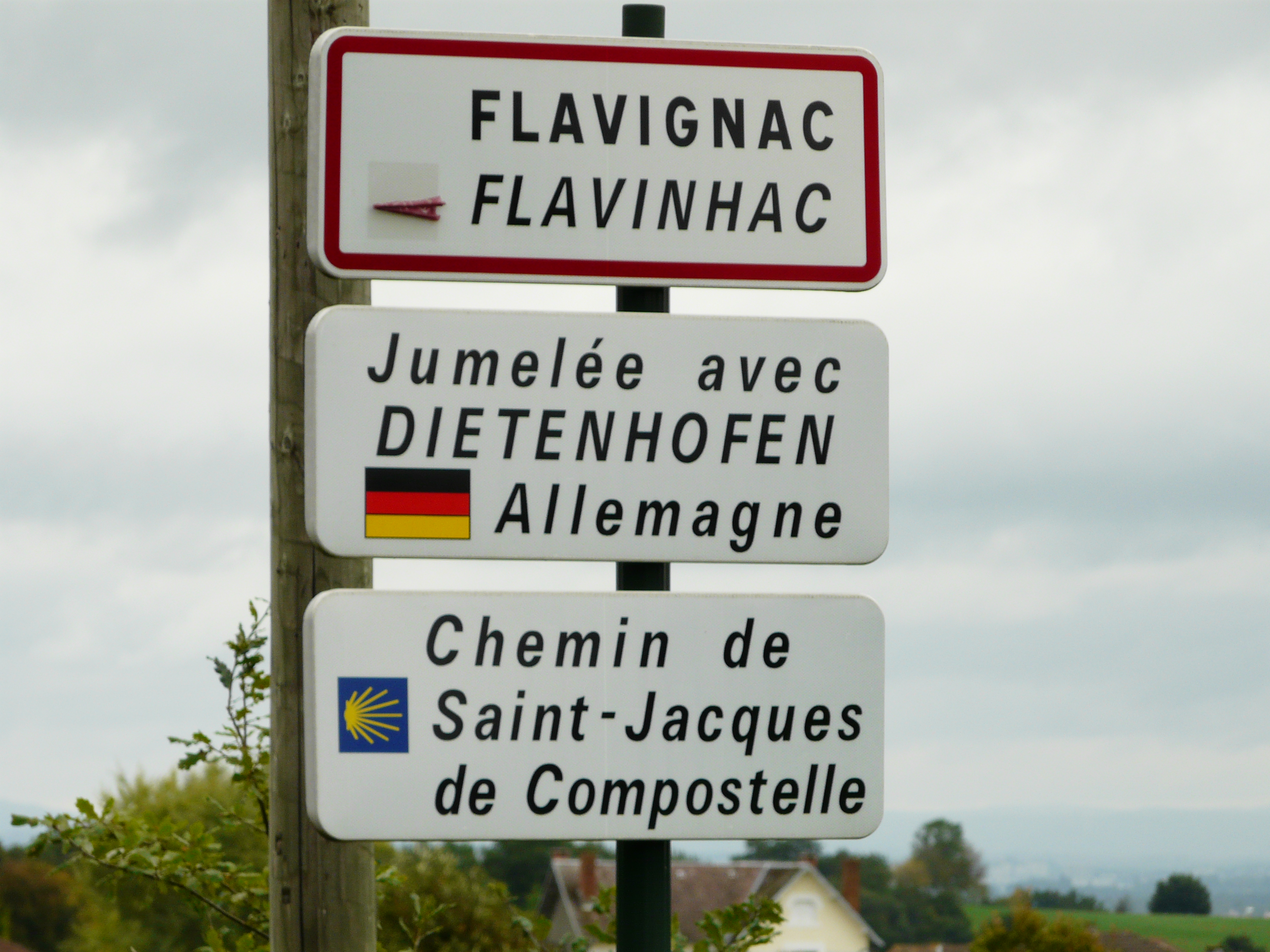 Panneau d'entrée en français et occitan à Flavignac, Haute-Vienne, France.